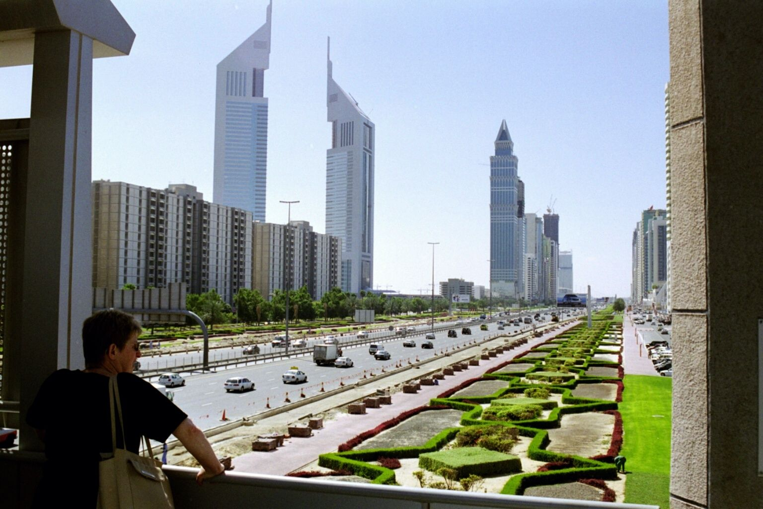 Dubai: Sicht auf Emirate Towers